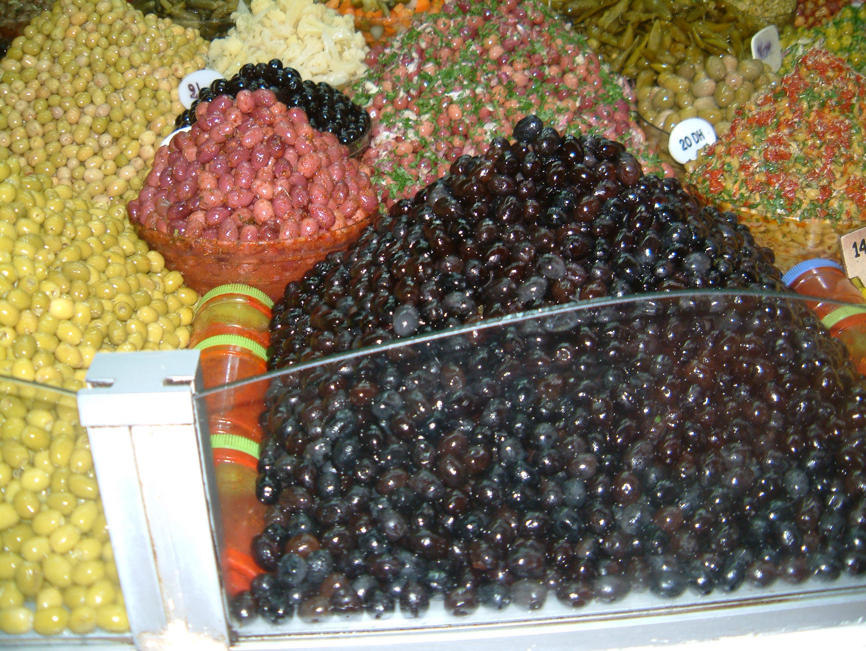 Basar in Tanger: Oliven